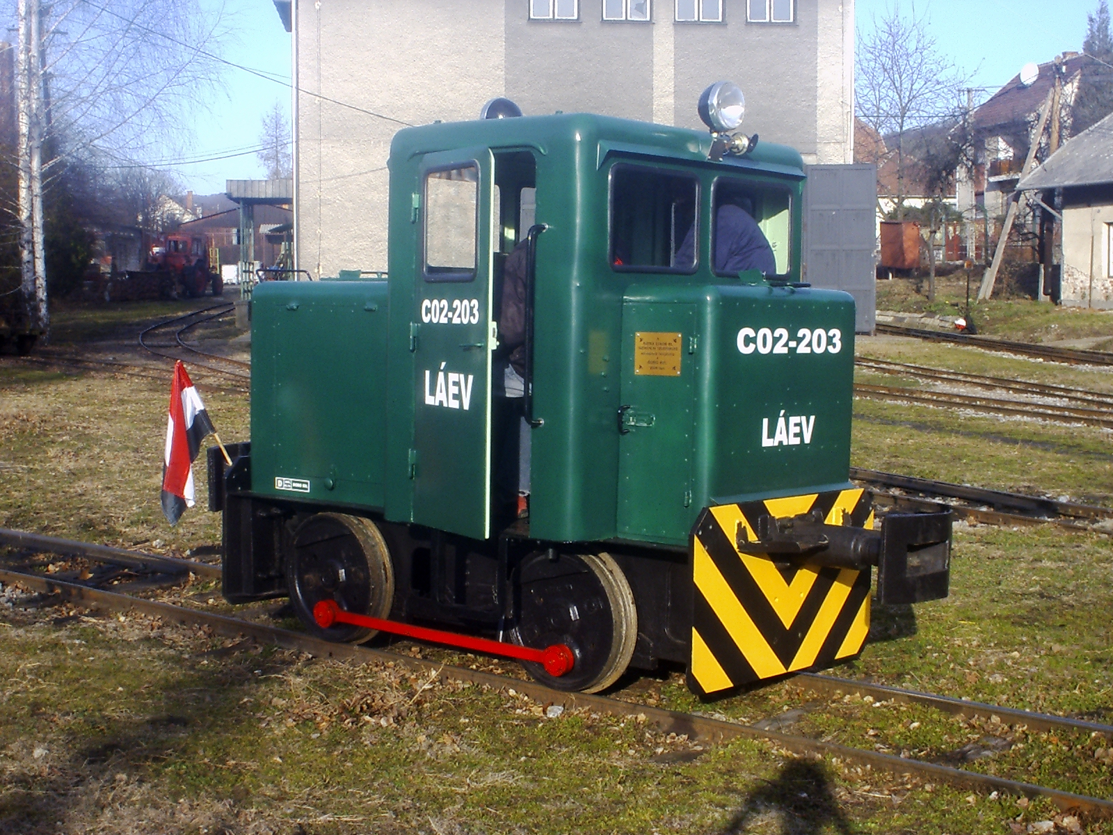 B26-os dízelmozdony a Lillafüredi Állami Erdei Vasúton(Hungarian diesel lokomotiv typ. B26)